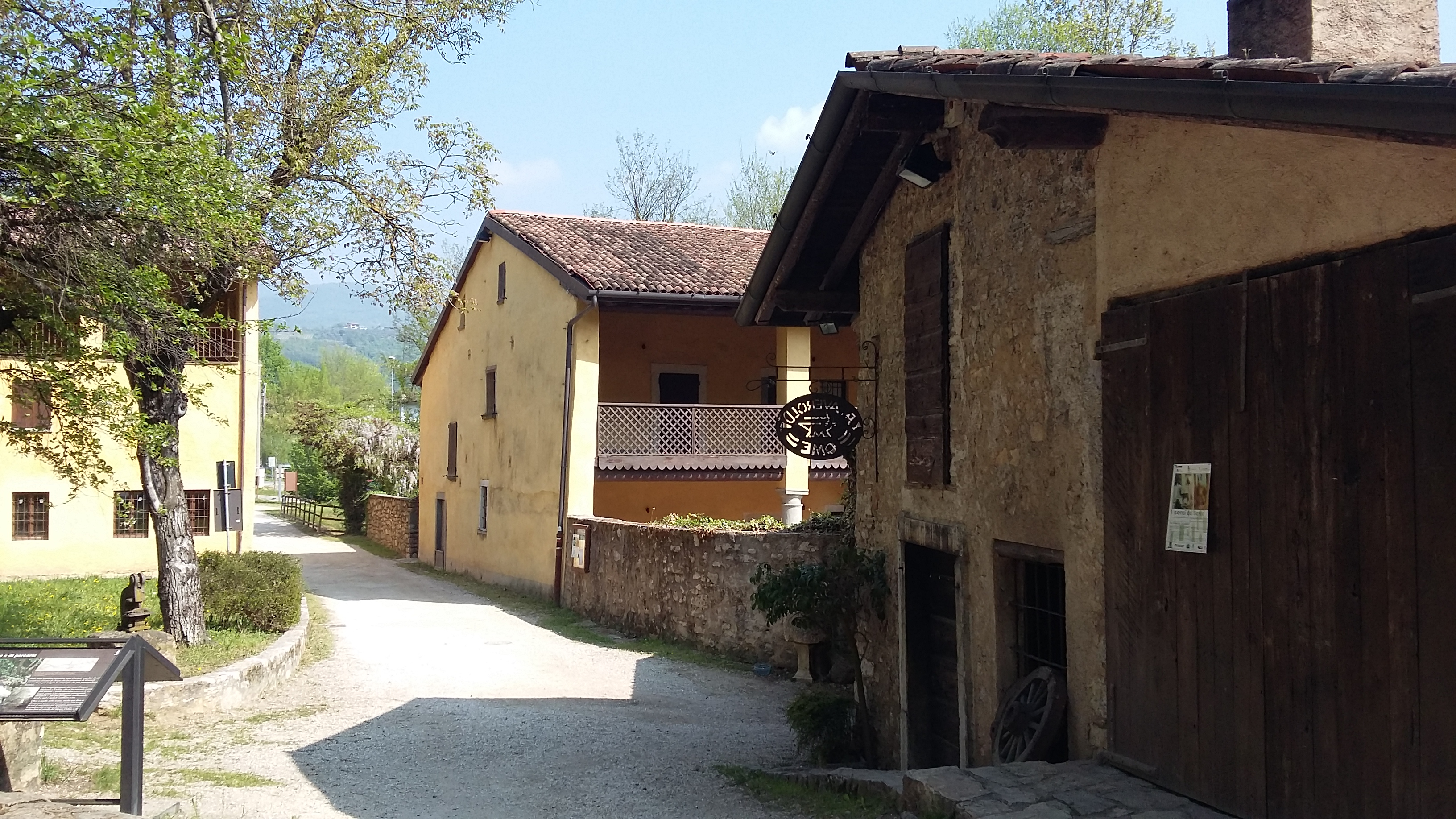 Borgo del Maglio Averoldi